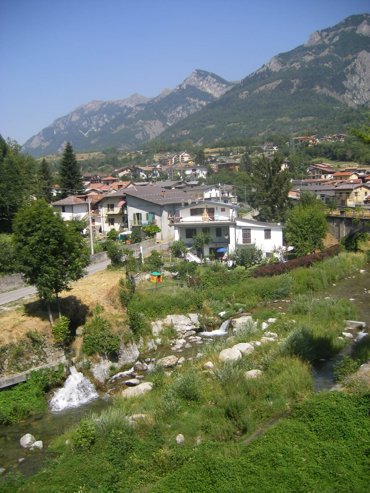 Demonte